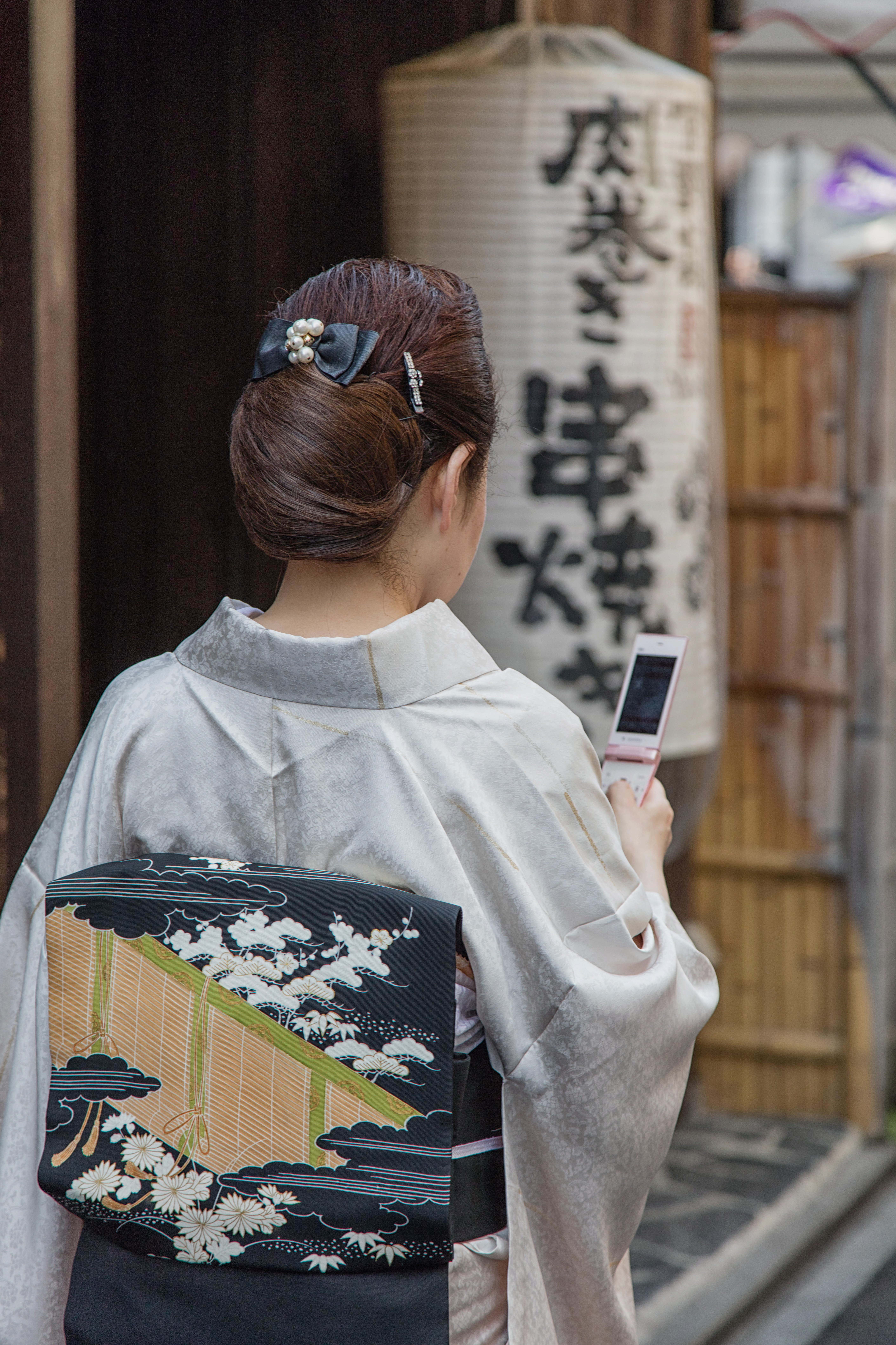 5G9A3625-Edit-Edit